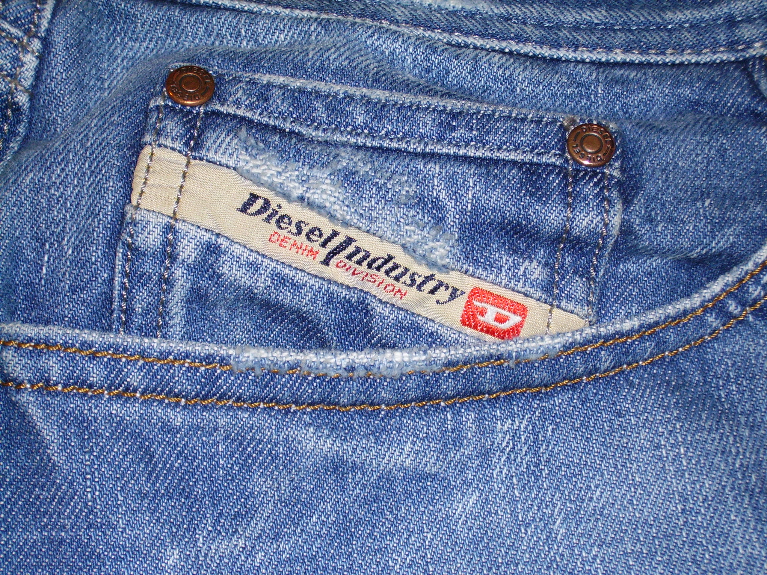 Jean Diesel avec la célèbre griffe de la marque cousue sur la poche droite